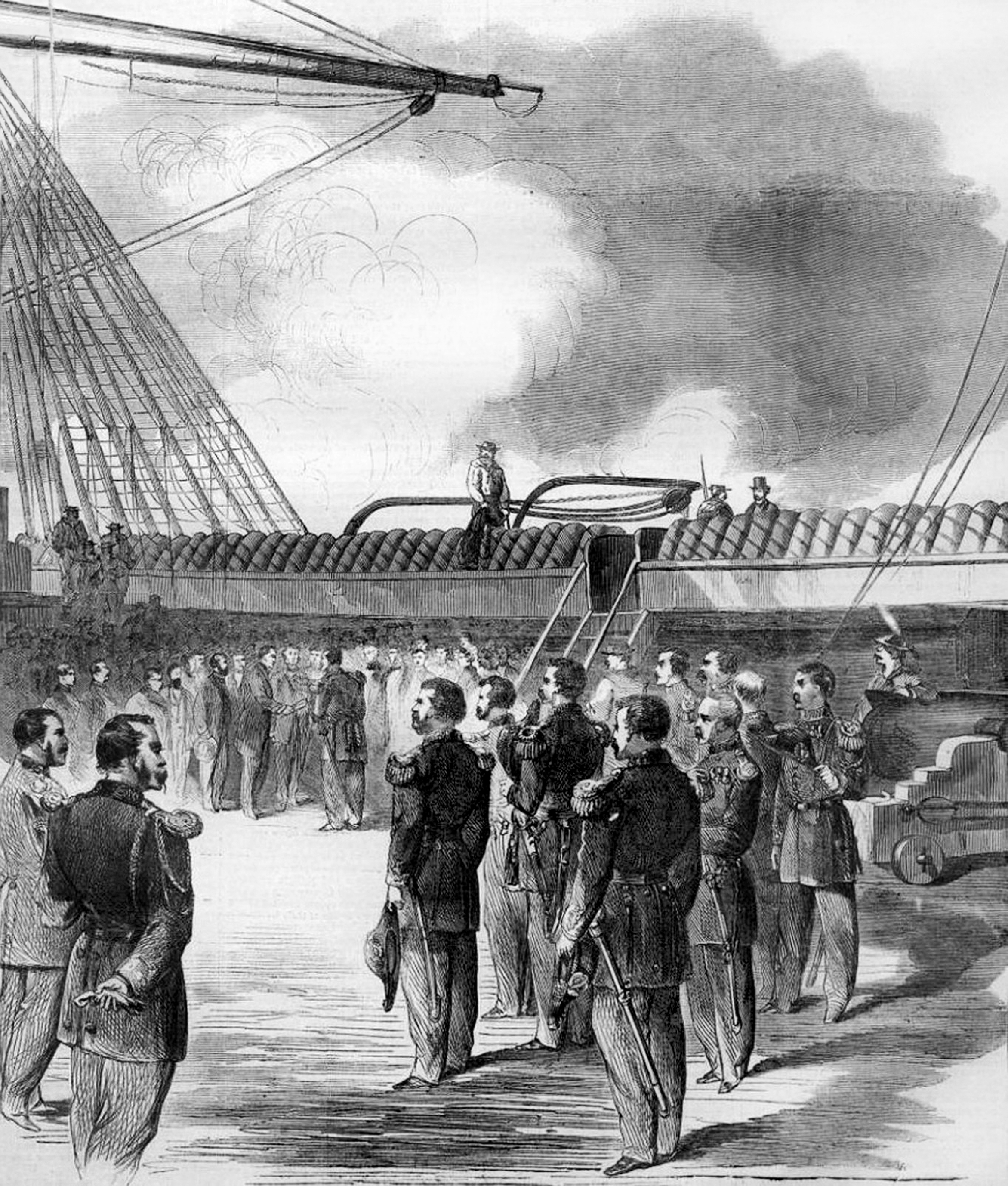 Американская общественность посещает фрегат Александр Невский по прибытии в САСШ. Иллюстрация из Harpers Weekly за 17 октября 1863 года